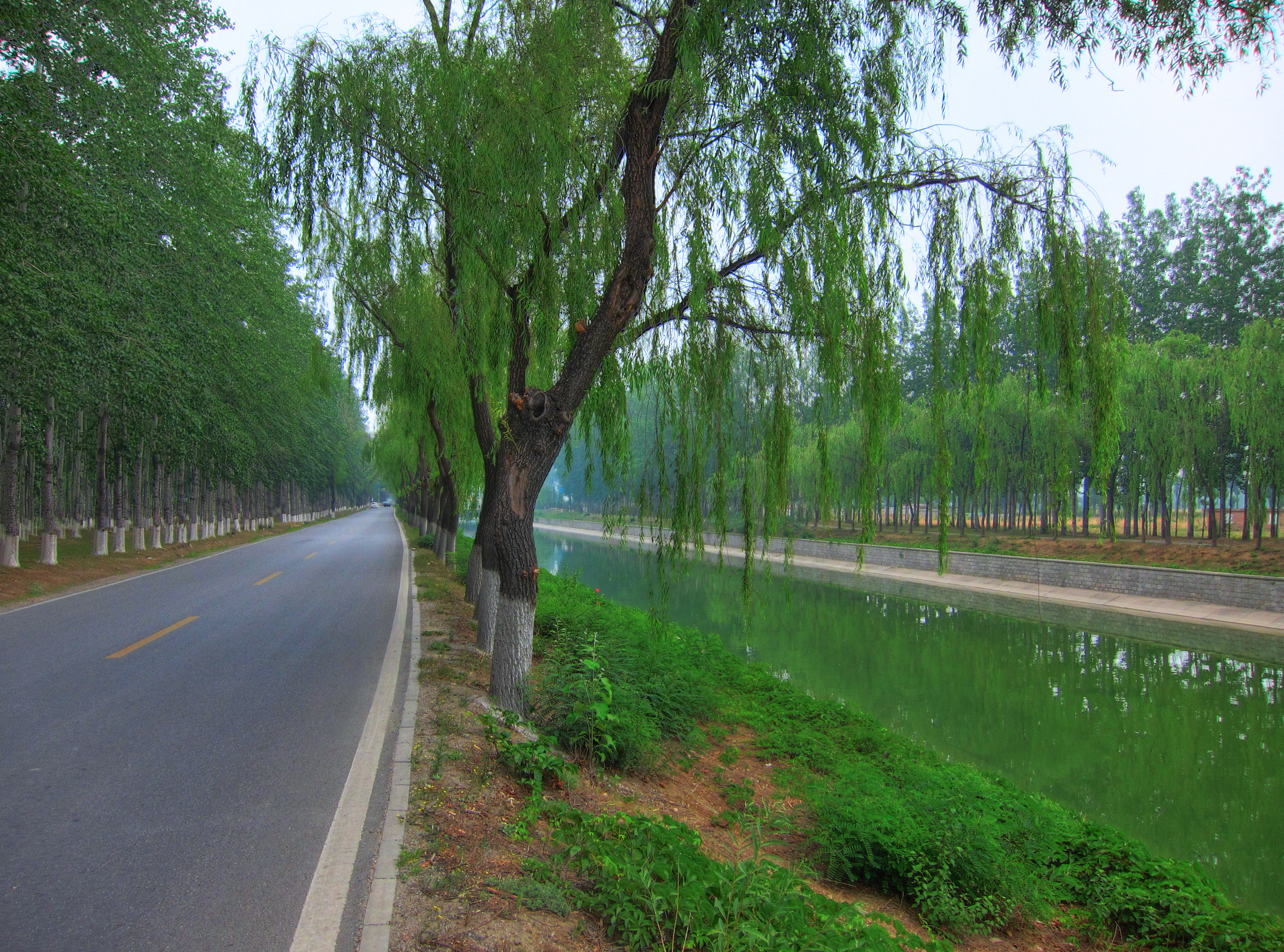 京引顺义-怀柔段